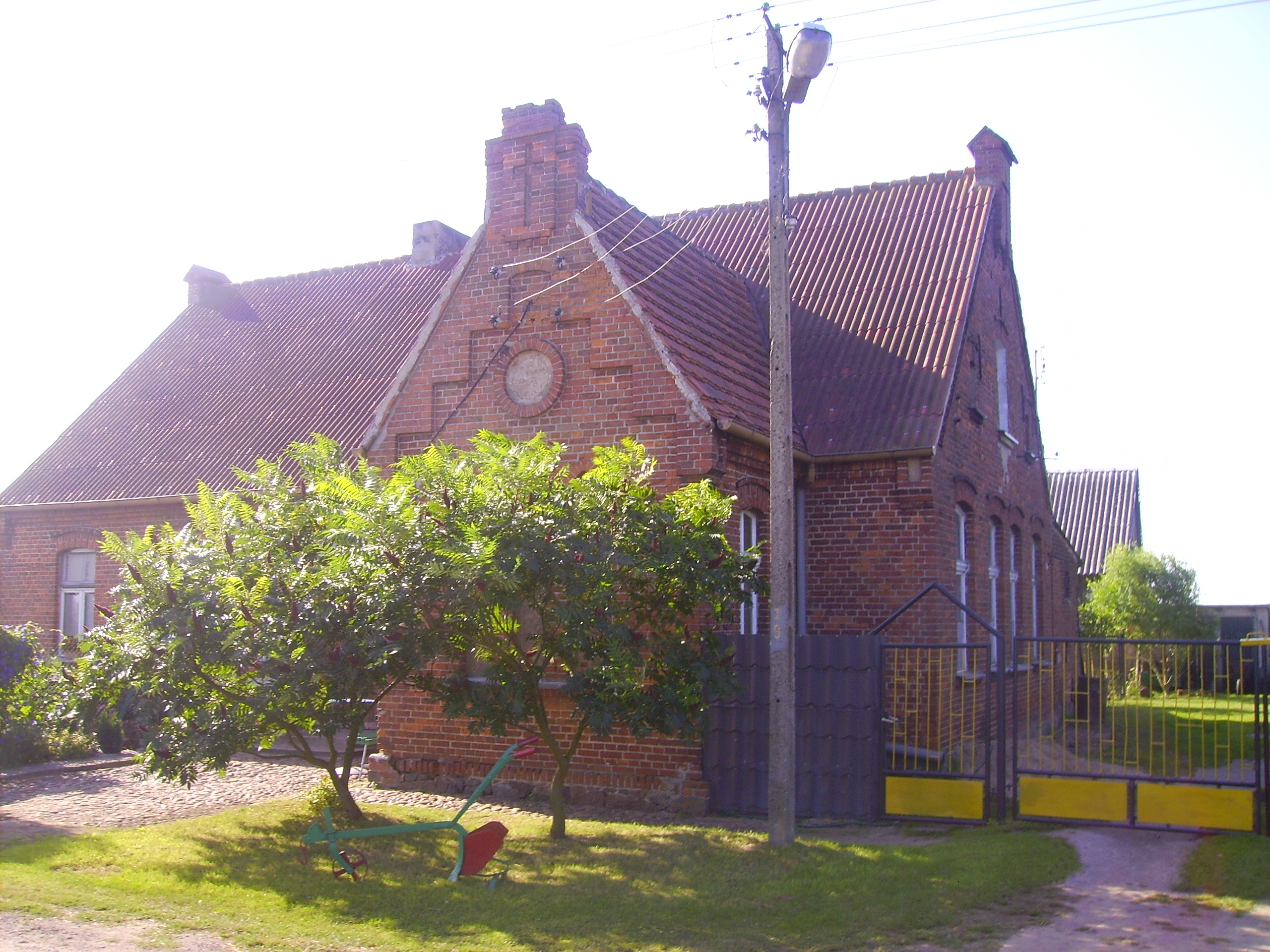 Była szkoła ewangelicka w Ruchocinie.